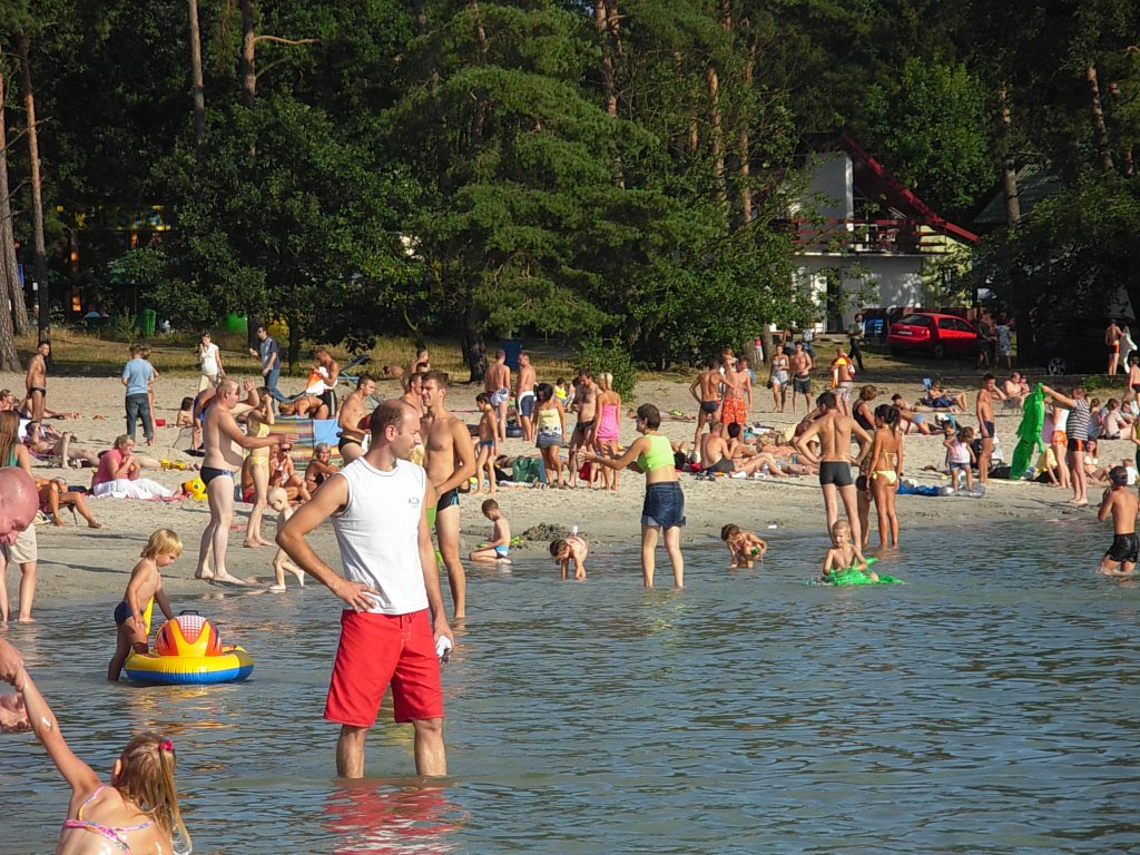 Plaża w Przyjezierzu